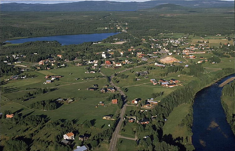 Motiv: Lillhärdal Nyckelord: Flygbilder, Riksintressen Kategori: Kyrkby, Skogslandskap Lillhärdal